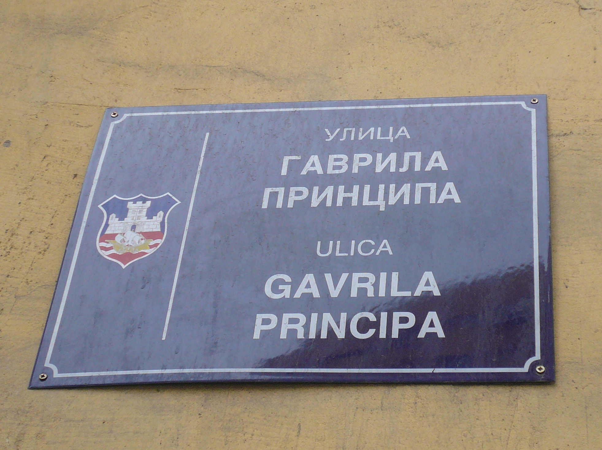 Табличка с названием улицы Гаврило Принципа в Белграде